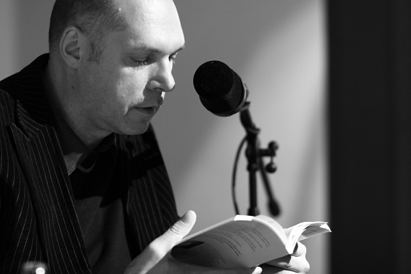 Carsten Klook 2010 im Brandshof (Foto: Christian Greve)